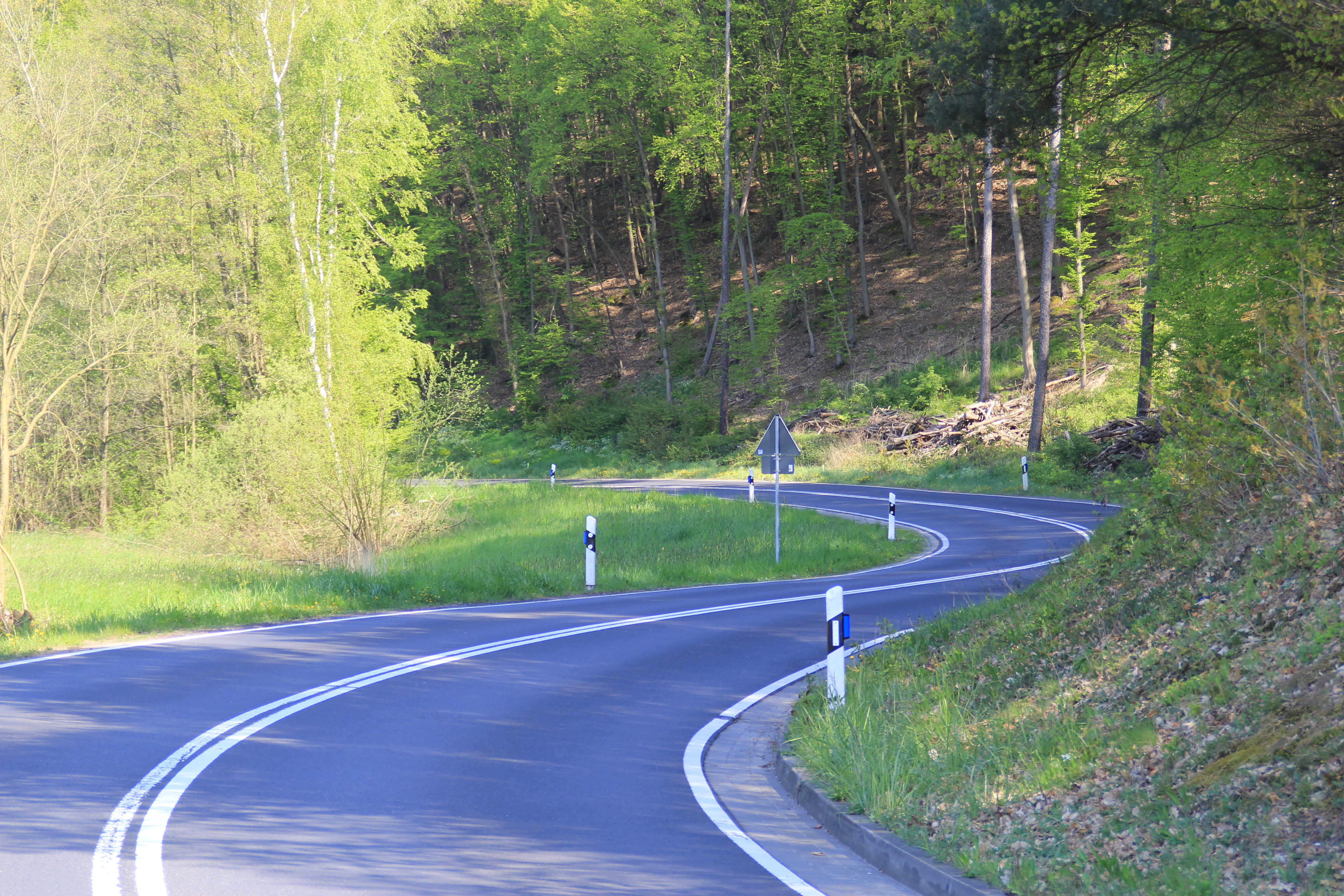 Die Hessenkurve der Staatsstraße 2305 bei Mömbris in Bayern